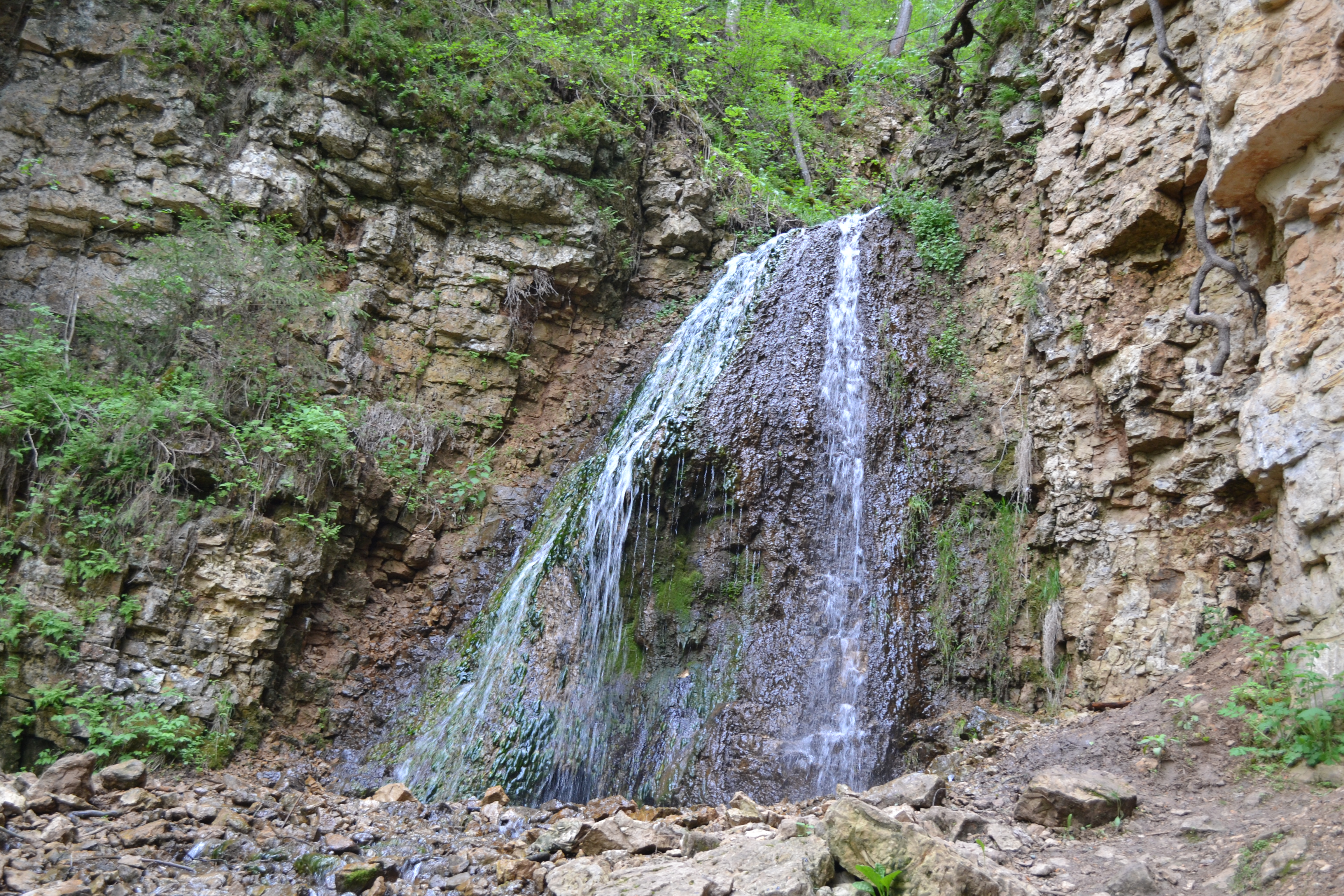 Береснятский ботанико-геологический комплекс, Советский район This image is related to the protected area of Russia number 4310236